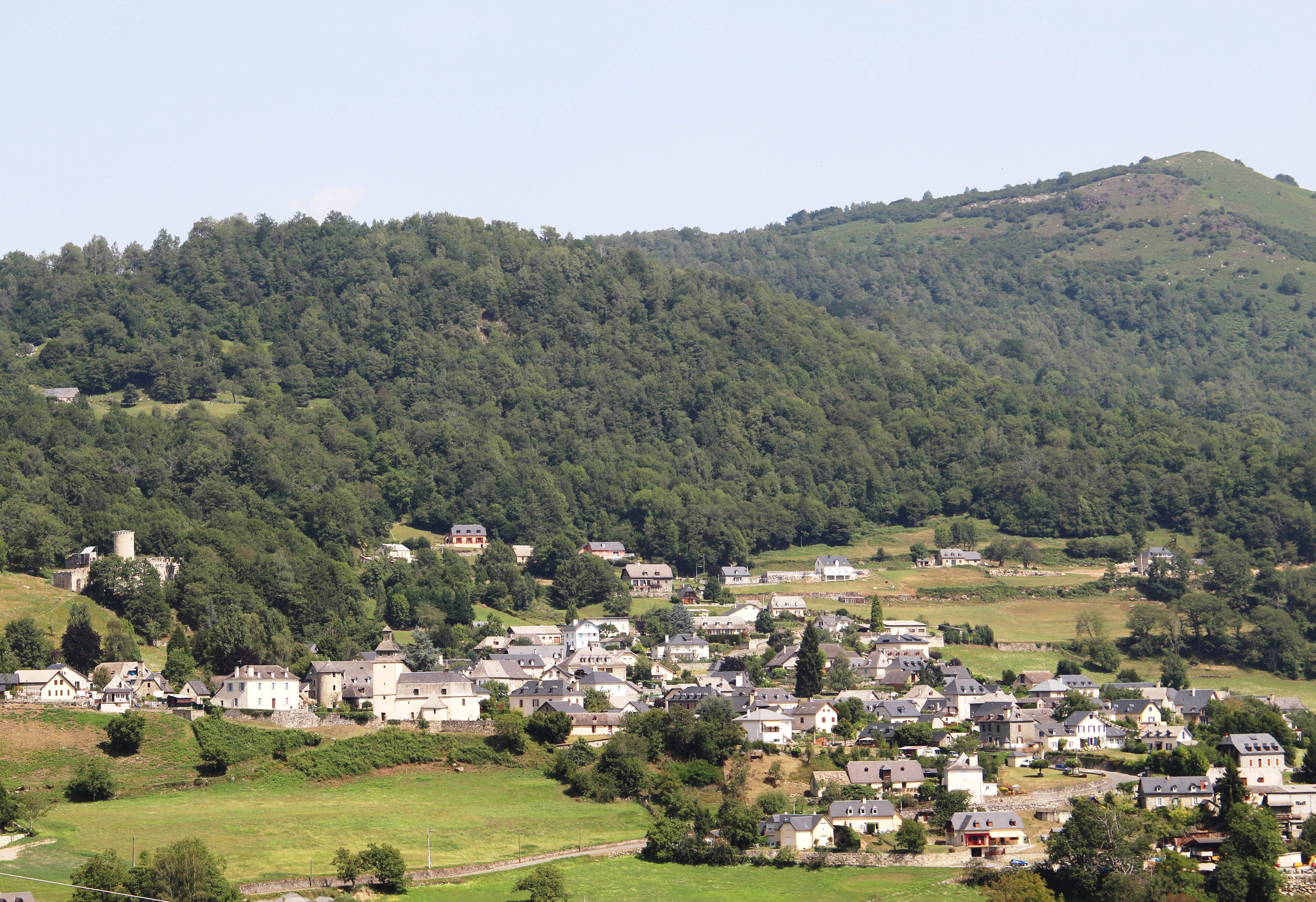 Arras-en-Lavedan (Hautes-Pyrénées)